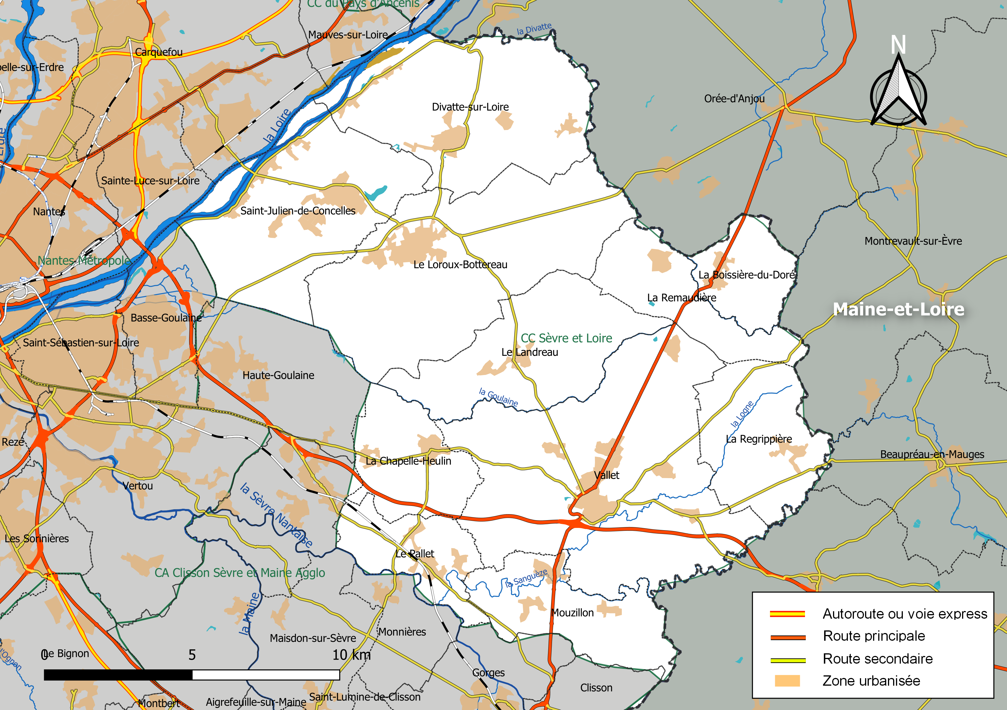 Carte géographique de la Communauté de communes Sèvre et Loire, département de la Loire-Atlantique, France. Composition au 1er janvier 2019.